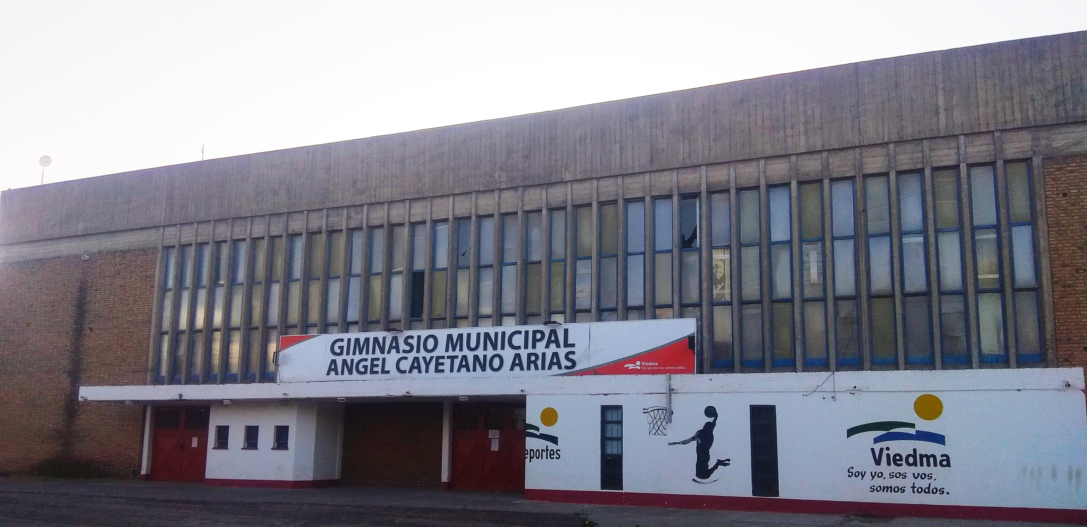 Gimnasio Municipal de la ciudad de Viedma.